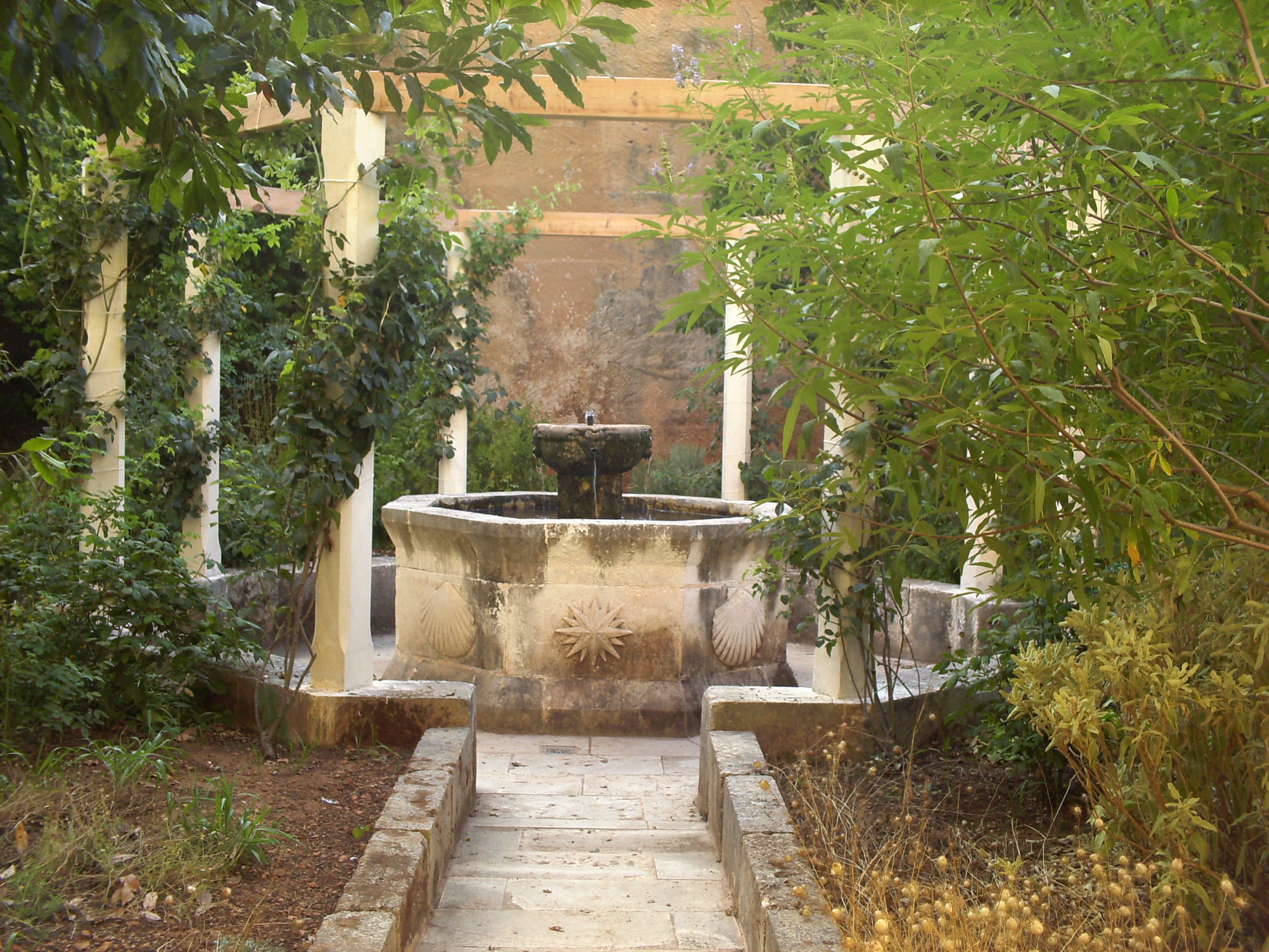 Pedreres de s'Hostal, Ciutadella, Menorca